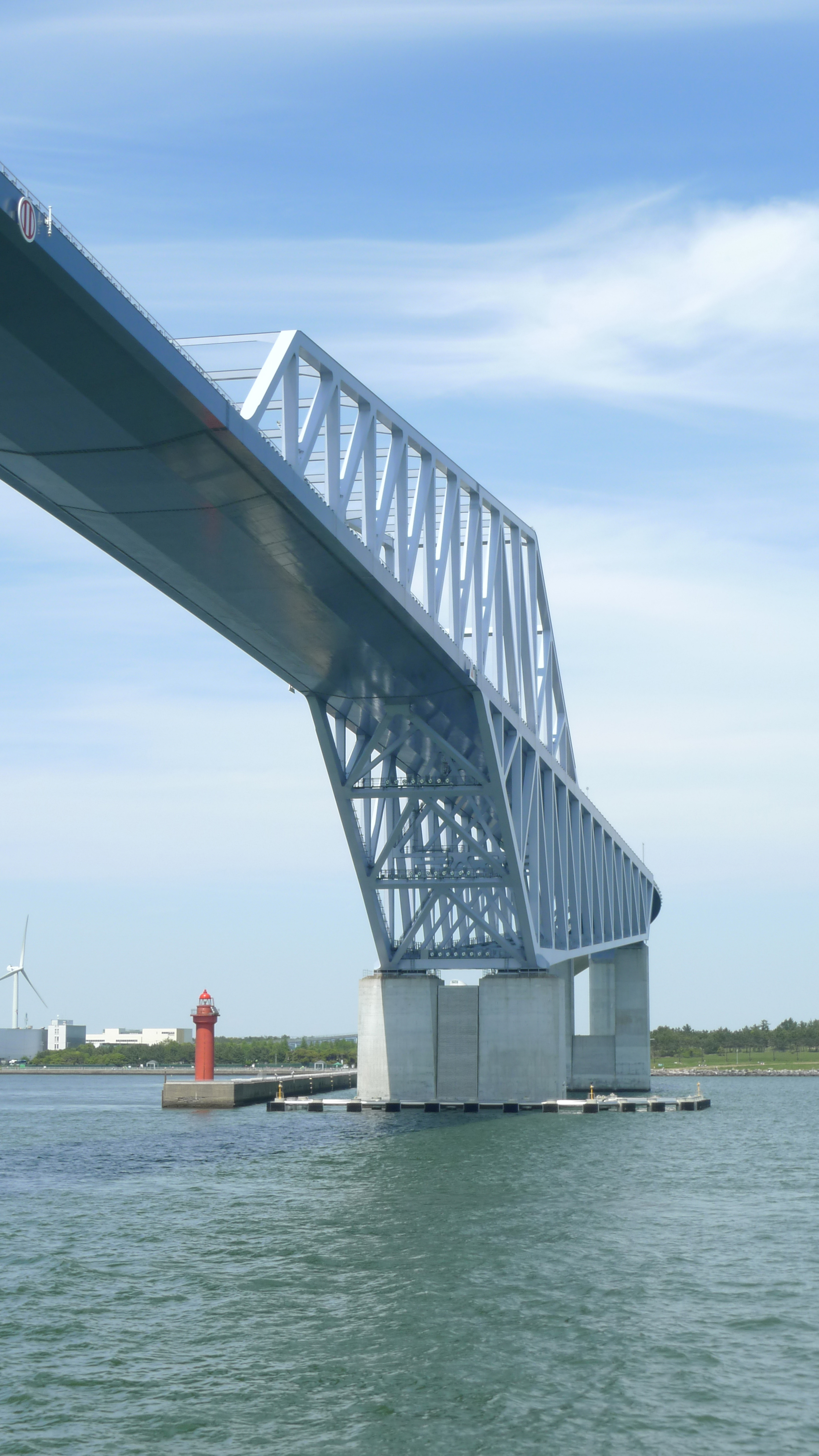 東京都観光汽船安宅丸から望む東京ゲートブリッジ下部